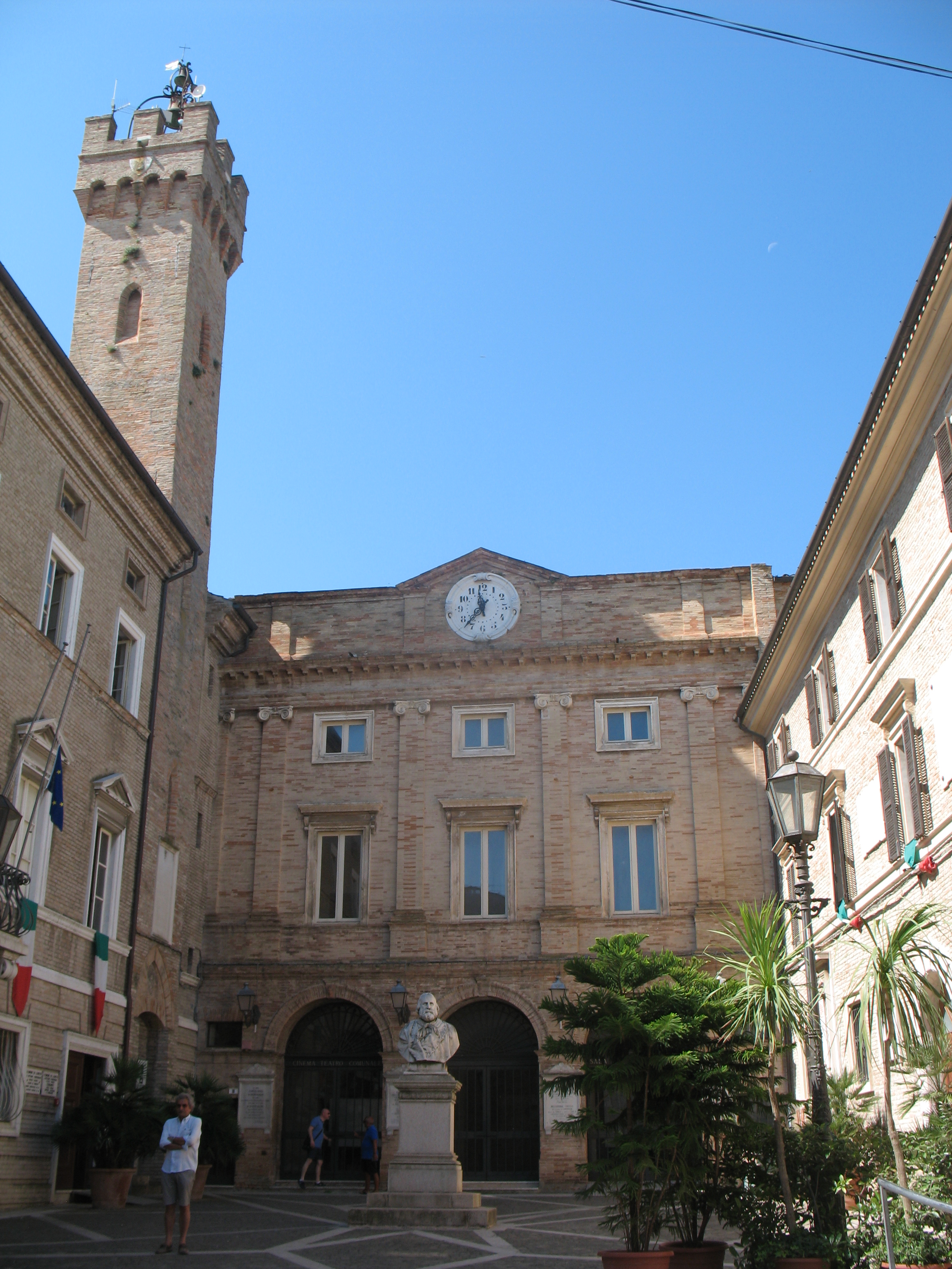 Il centro storico di Loreto